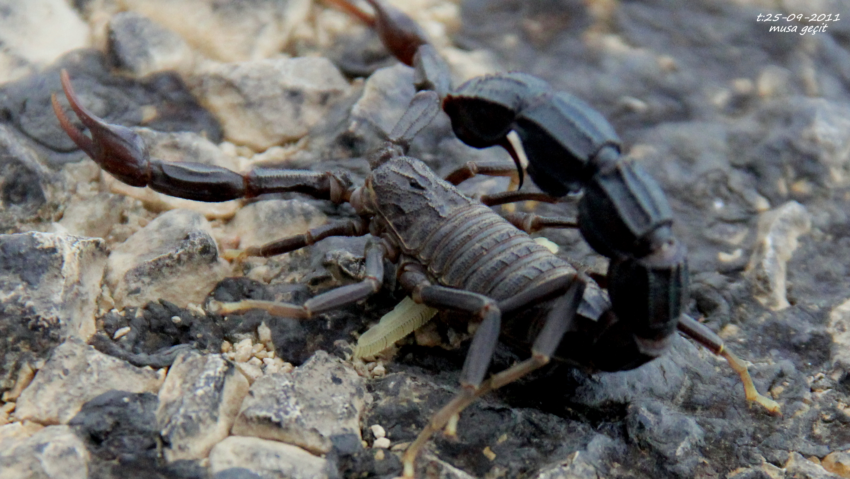 Mardin-Akreplerde Tarak (pecten) görüntüsü